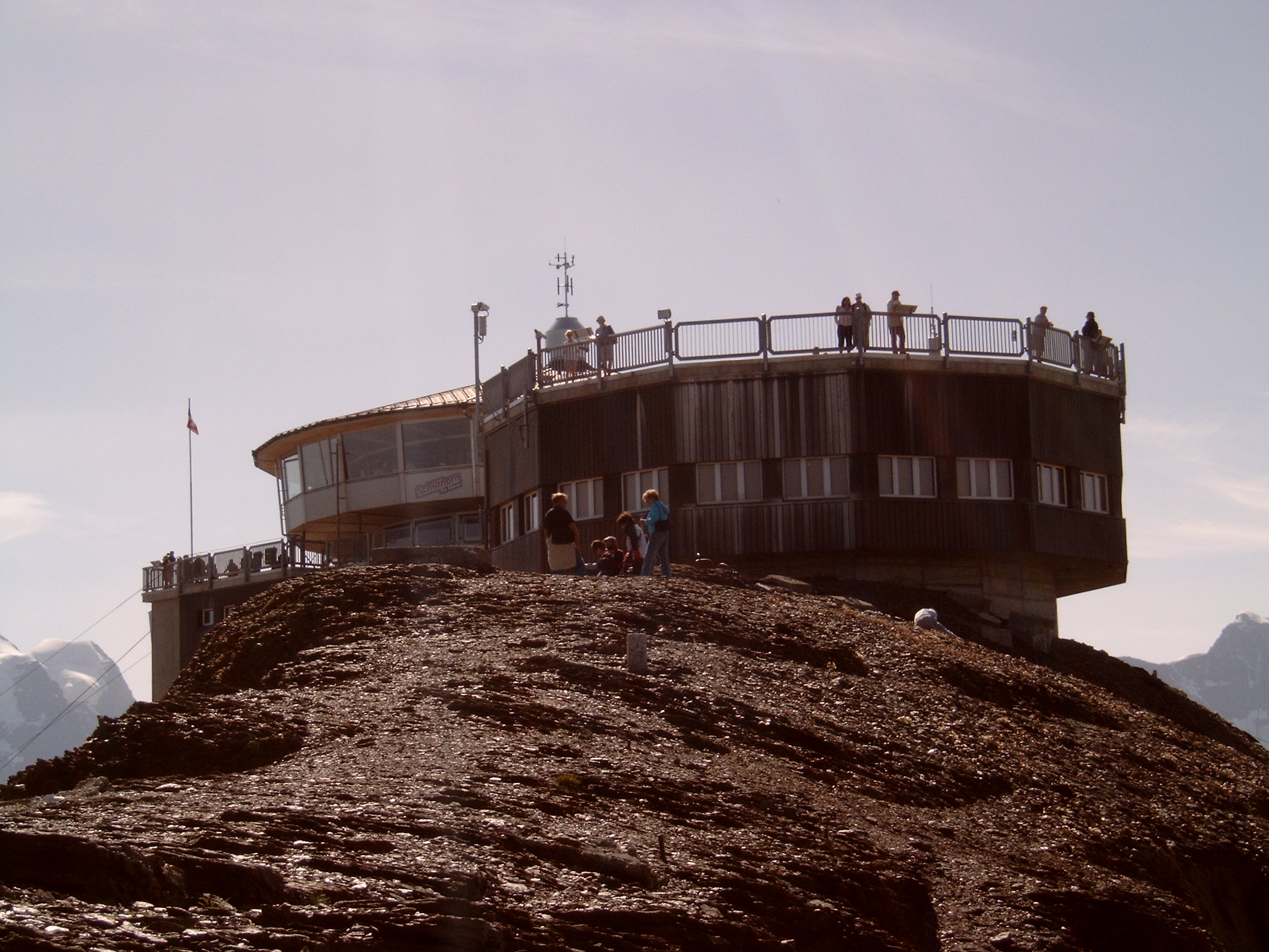 Piz Gloria